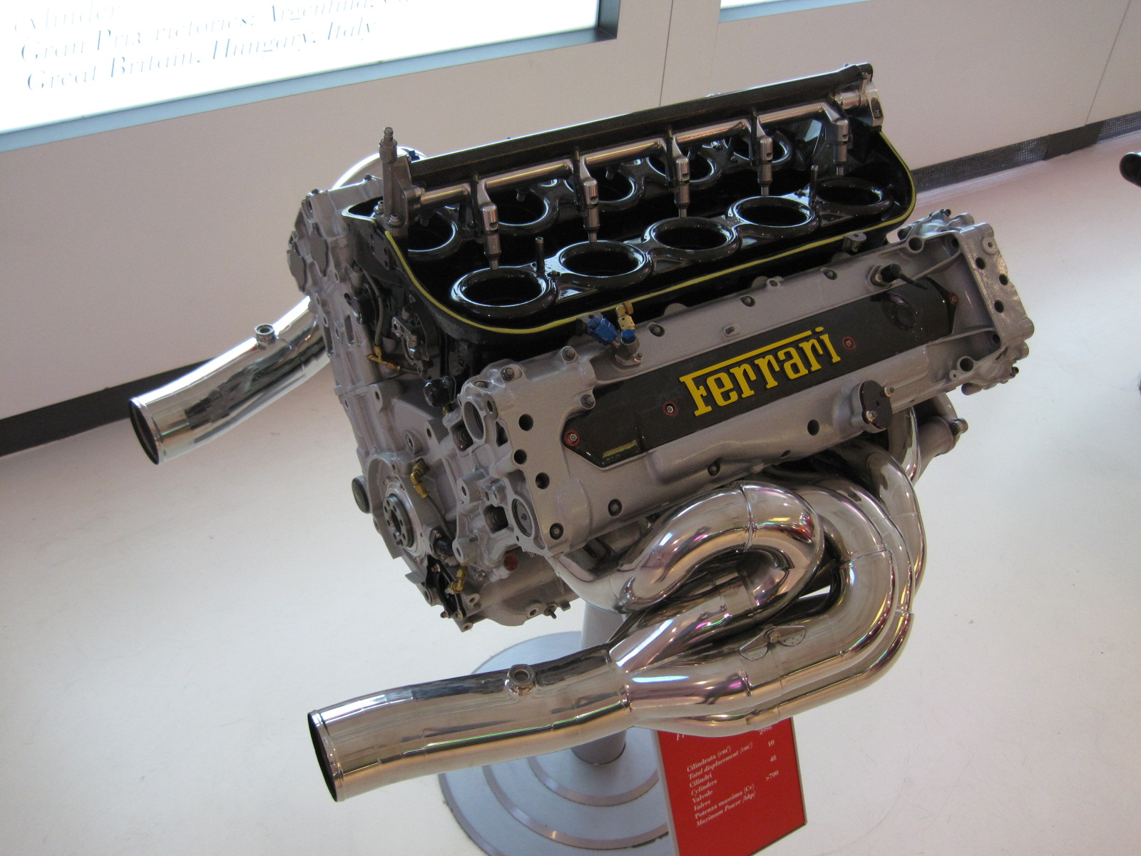 Collections of the Galleria Ferrari - Moteur Ferrari 047 du championnat du monde F1 1998 - 10 cylindres / 48 soupapes